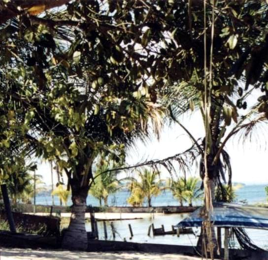 Descrição: Praia do Rio Sucuriú, em Três Lagoas, Mato Grosso do Sul, Brasil.